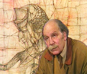 Portrait de Fred Deux